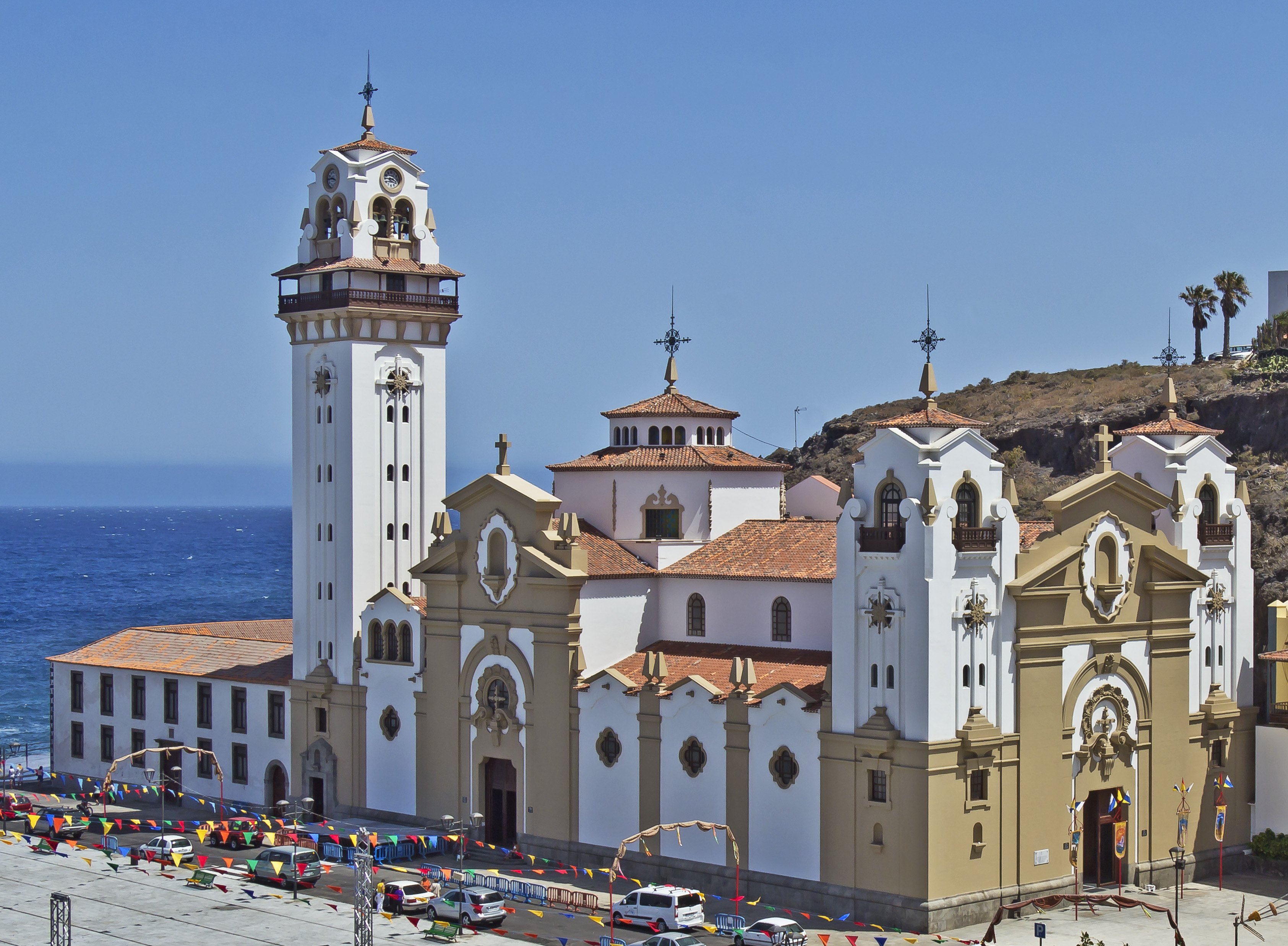 Basilika de Candelaria Blick von Nordwesten